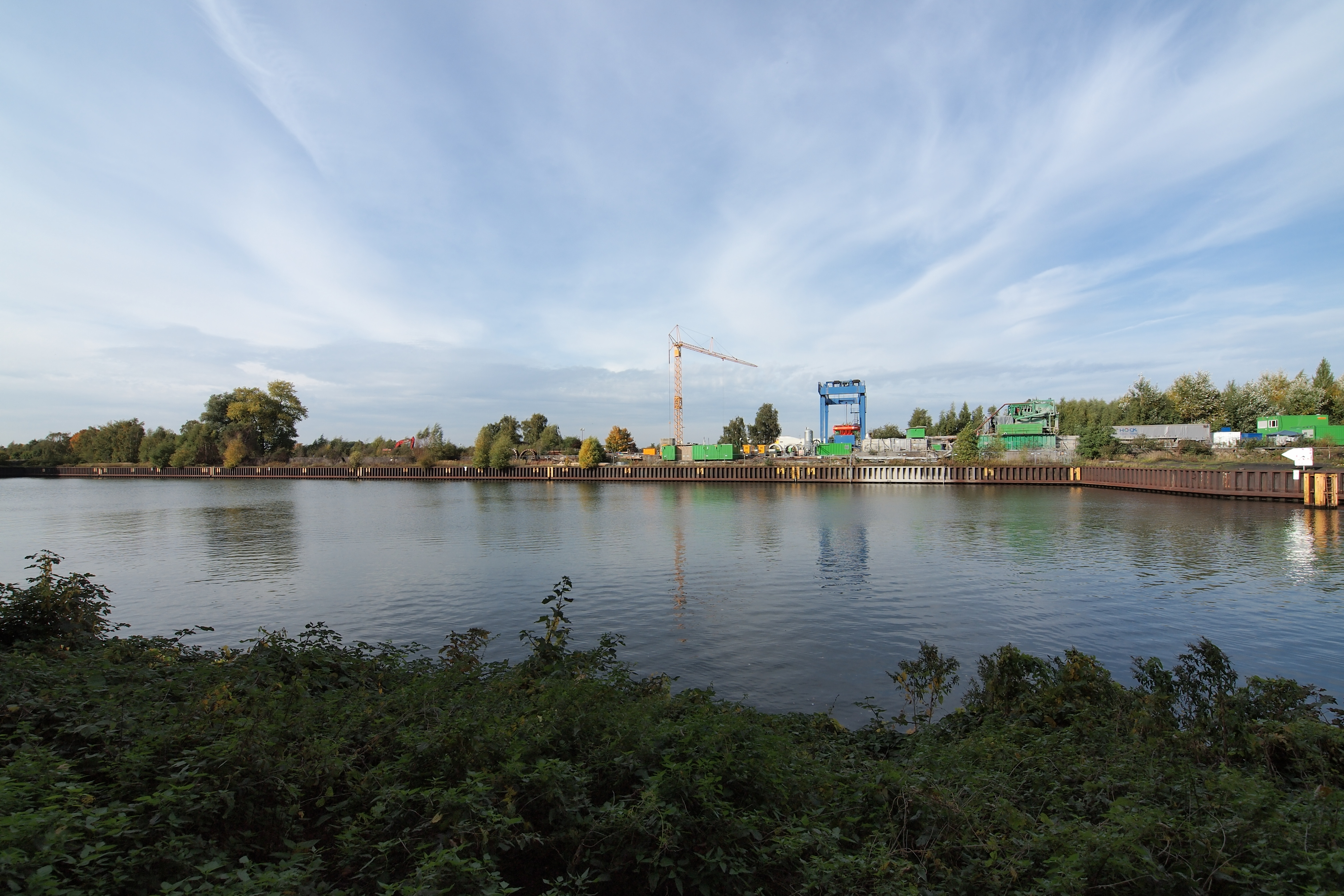 Hafen der ehemaligen Zeche Hugo in Gelsenkirchen. Im Hintergrund eine Baustelle für den neuen Emscherkanal UmbaudesEmschersystems.